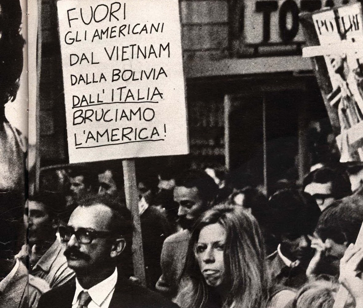 Giangiacomo Feltrinelli e Sibilla Melega ad una manifestazione Guevarista